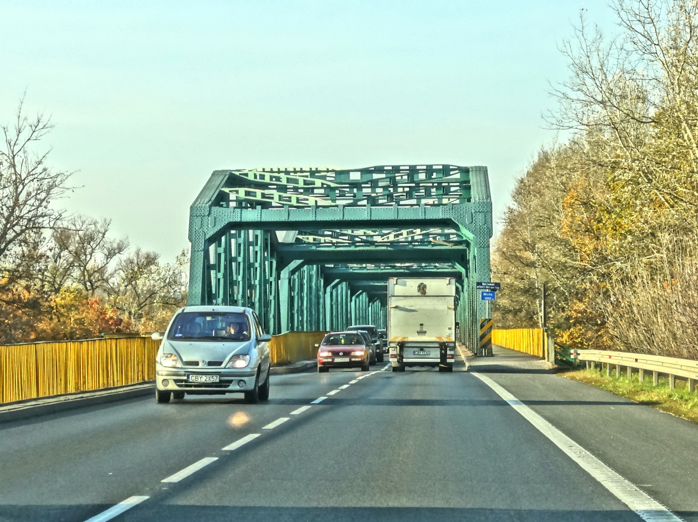 Most fordoński im. Rudolfa Modrzejewskiego nad Wisłą w Bydgoszczy-Fordonie